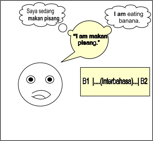 Ilustrasi interbahasa